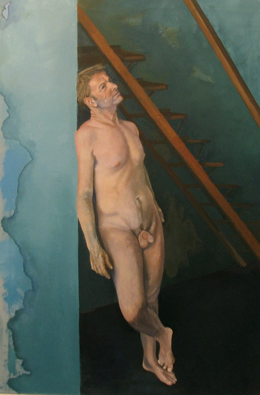 Artist Ora Ruven, Man 5, 110x90 cm, oil on canvas, 2010, an item from the series "Naked Men"